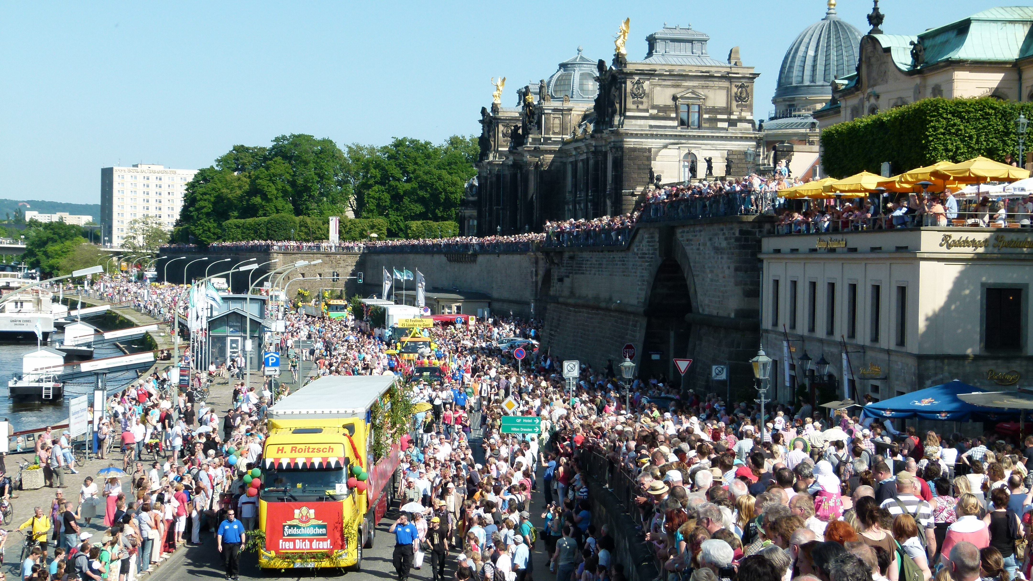 Abschlußparade des 42. Internationalen Dixieland-Festivals am Elbufer in Dresden, Sachsen